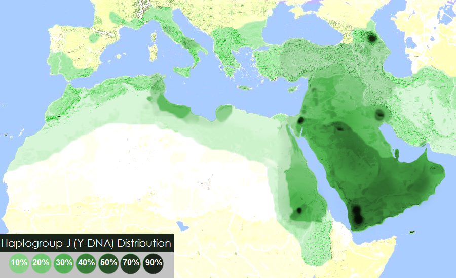 J Haplogroup (ref. Genetic Atlas)